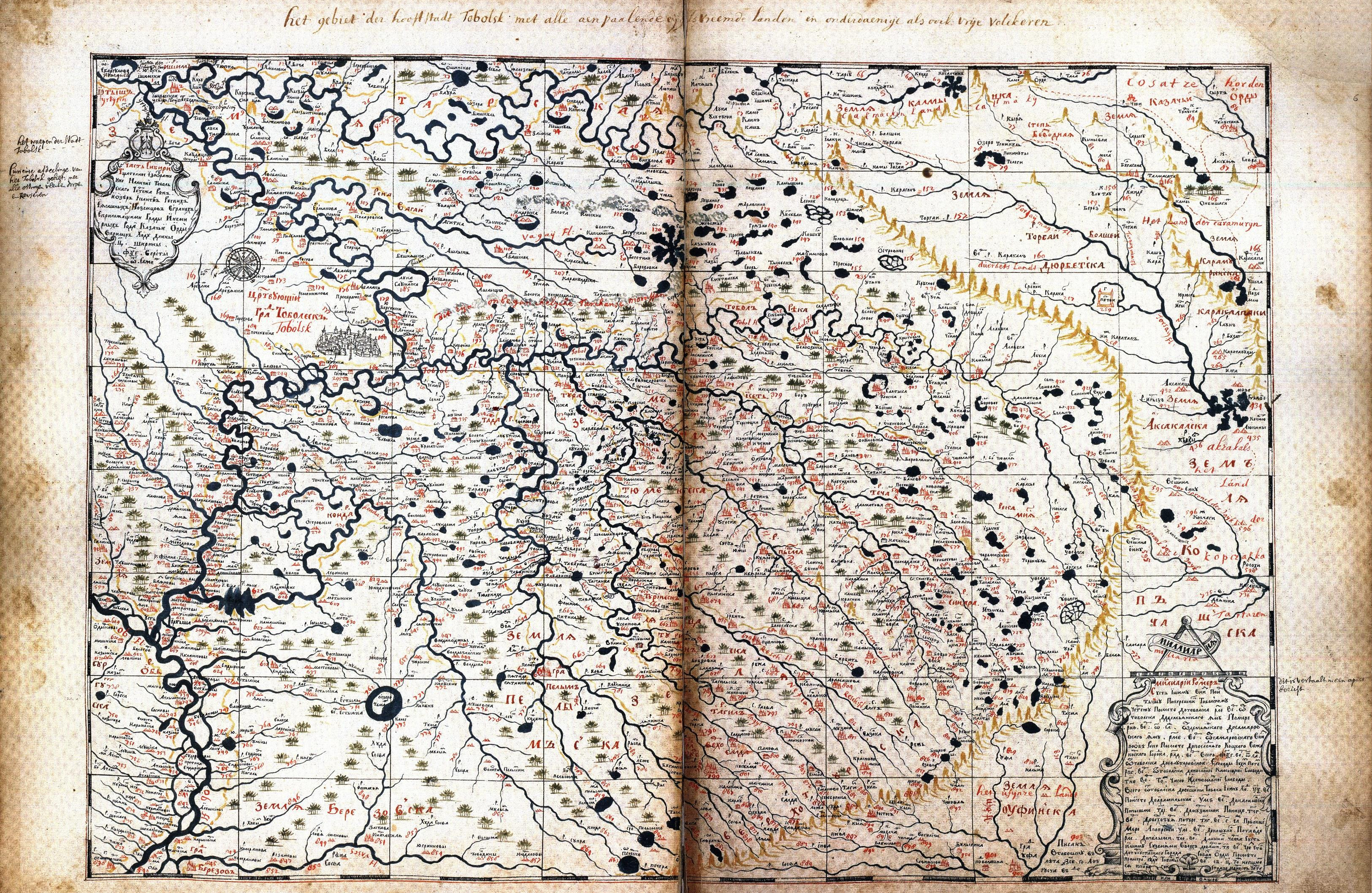 Чертеж земель Тобольского края (карта). Лист 2